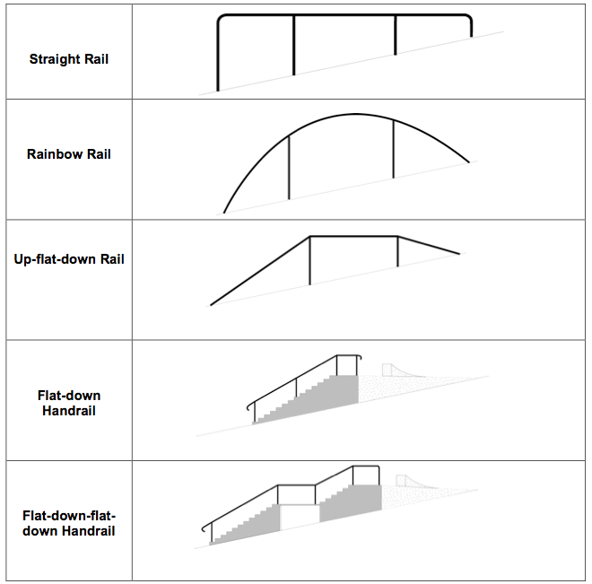 Forskellige typer rails